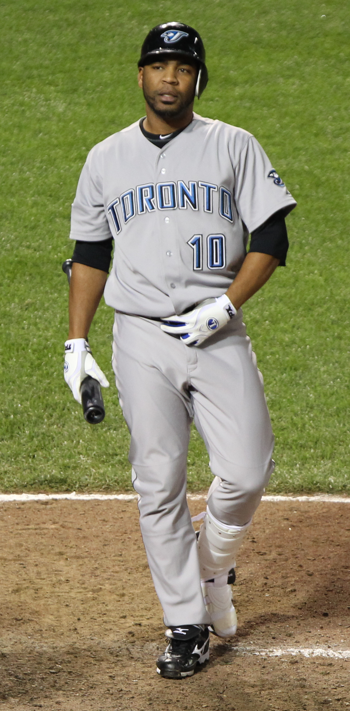 Edwin Encarnación